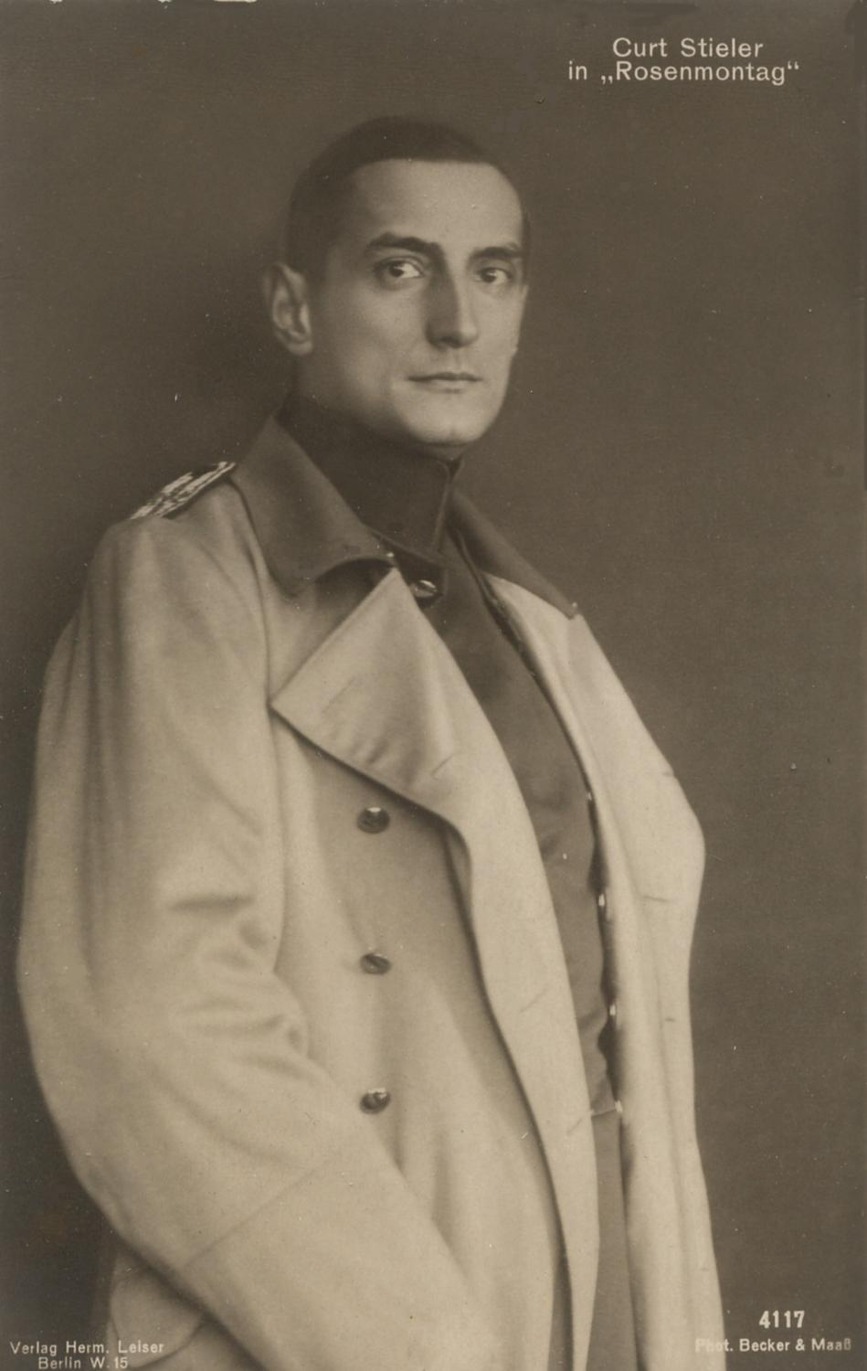 Curt Stieler in "Rosenmontag", c. 1920. Photopostkarte des Ateliers (Otto) Becker & (Heinrich) Maass